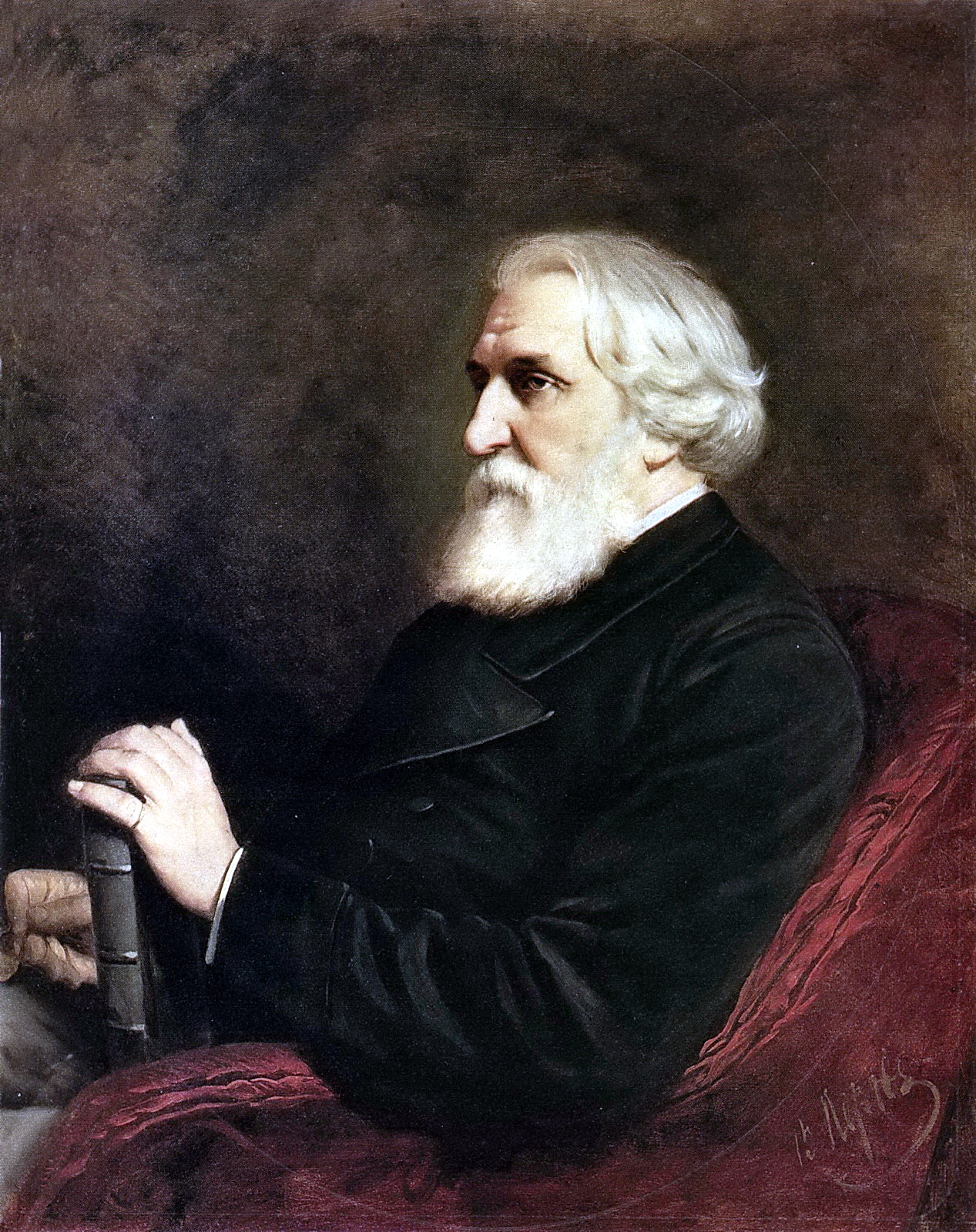 Портрет И.С. Тургенева